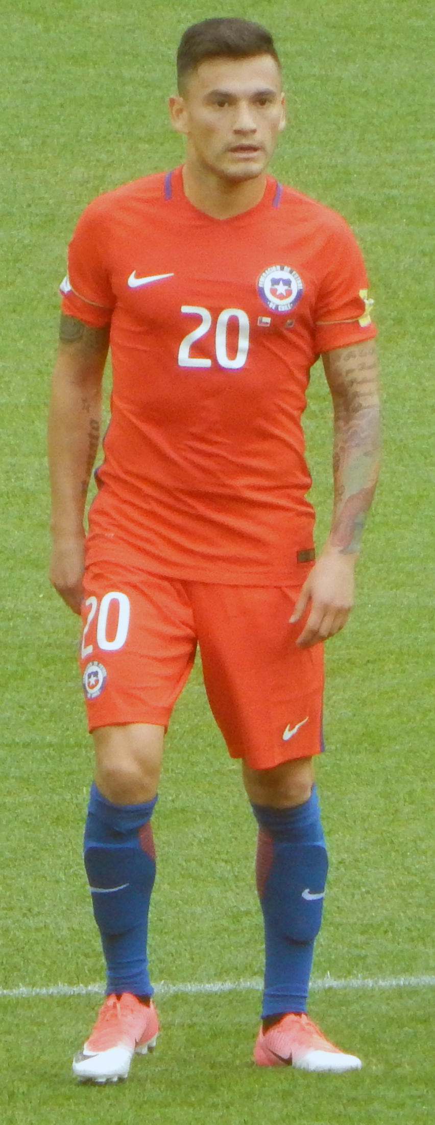 Чарлес Аранхис Матч Чили – Австралия